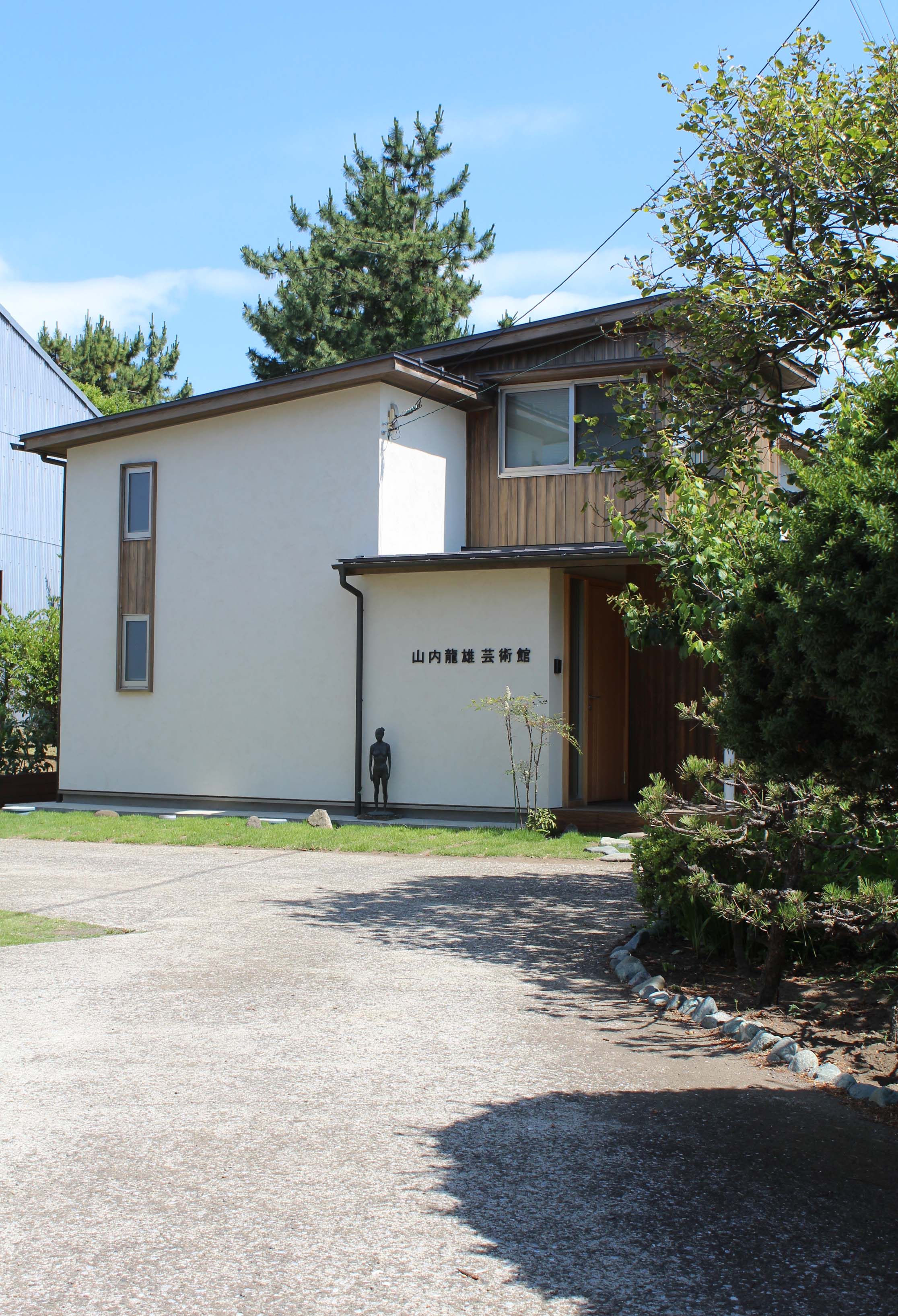 山内龍雄芸術館の外観写真